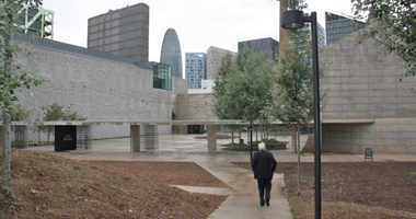 El Museo Can Framis en Barcelona, es el Museo de Pintura Contemporánea de la Fundación Vila Casas en el que se encuentran alrededor de 300 obras pictóricas expuestas que datan desde la década de los 60 hasta la actualidad, de diversos artistas nacidos o residentes en Cataluña.